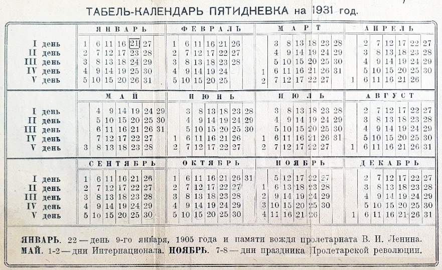 Soviet calendar for 1931 showing 360 days of the Gregorian year by excluding five national holidays so that the five-day work week can be displayed as five rows.